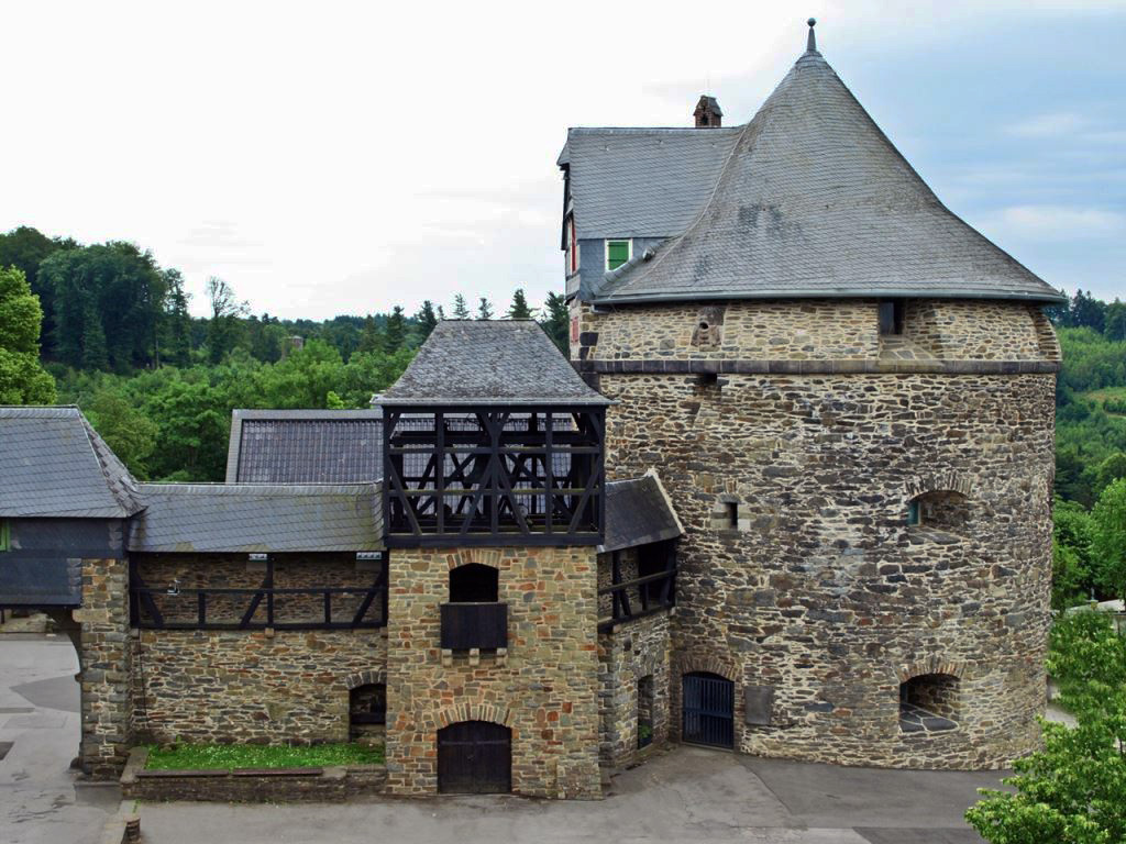 Schloss Burg, Glockenstuhl und Batterieturm (Gedenkstätte des Deutschen Ostens).